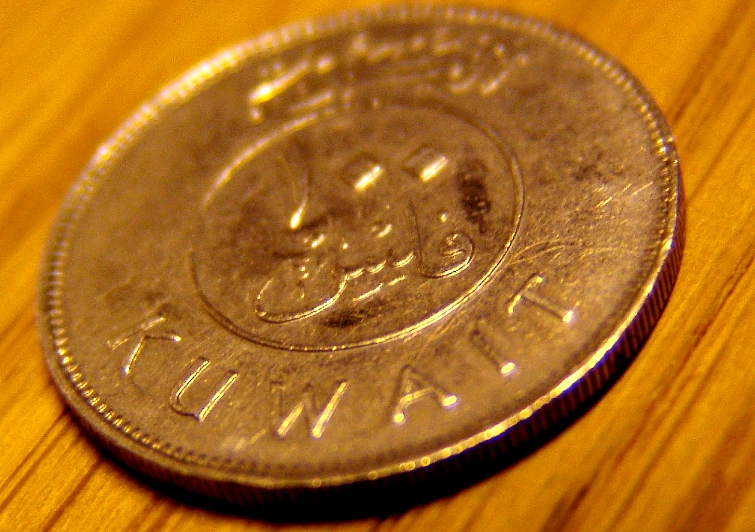 100 Fils Kuwaiti